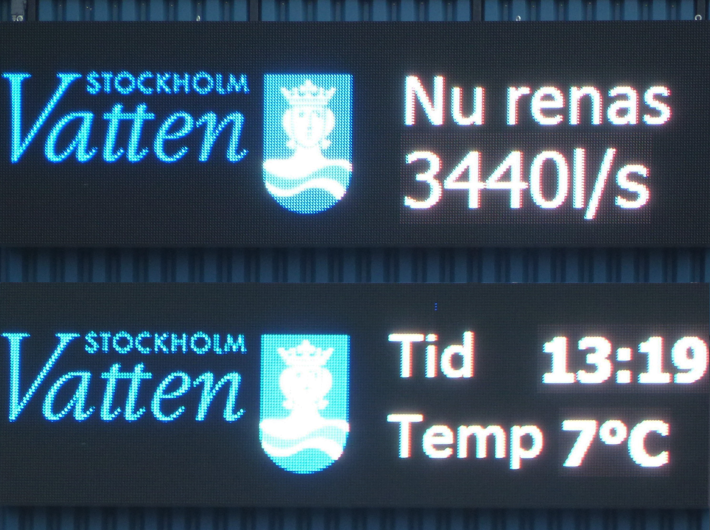 Henriksdals reningsverk, tid och reningsmängd (fotomontage)